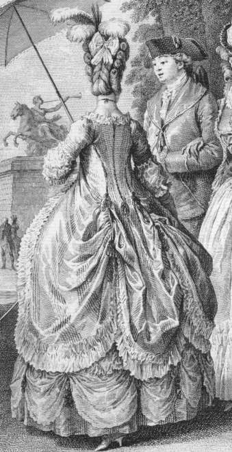 Robe à la Polonaise, 1770s in a contemporary engraving